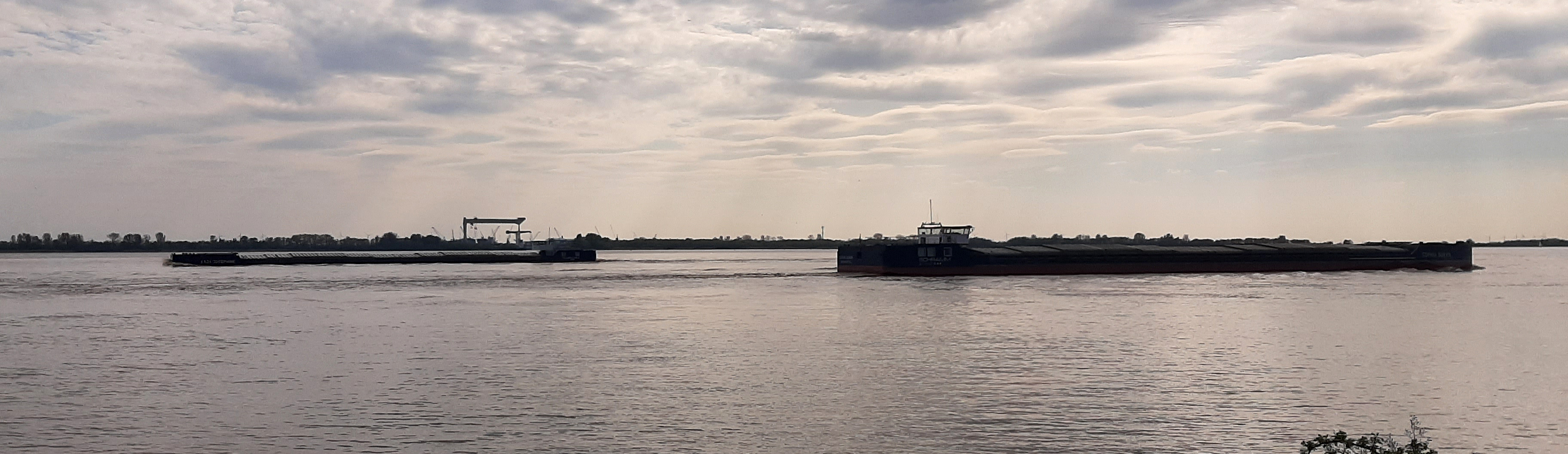 Die Binnenschiffe Kaja Josephine (links, elbaufwärts fahrend) und Sophia Soraya (rechts, elbabwärts fahrend) auf der Unterelbe vor Hamburg-Blankenese, im Hintergrund das Mühlenberger Loch und die Werft an der Estemündung.